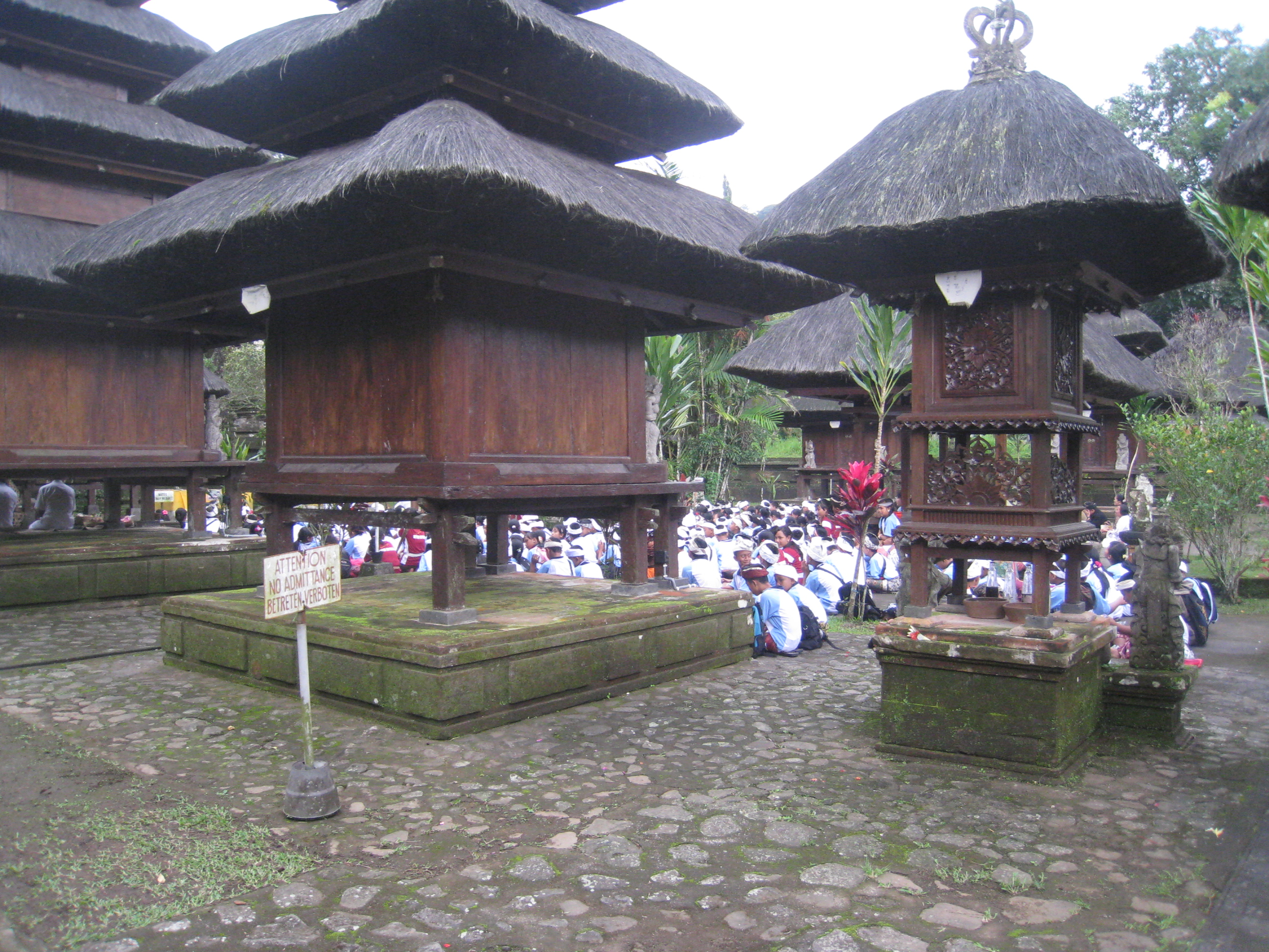 Pura Luhur Batukaru, hindu temple Bali